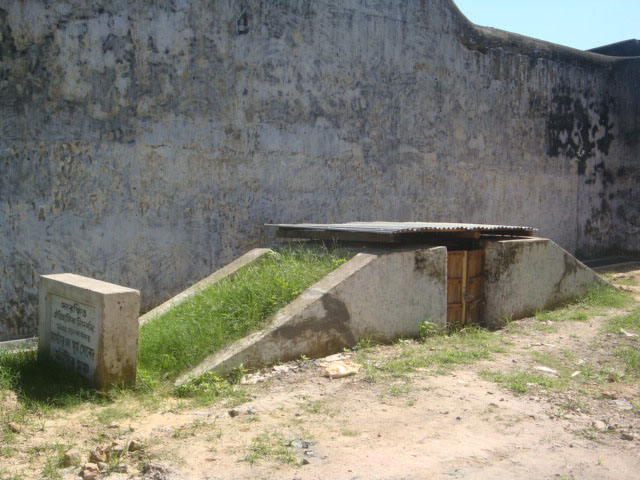 সুর্য সেন কে ফাঁসি দেয়ার স্থানের বামপাশ থেকে চিত্র।